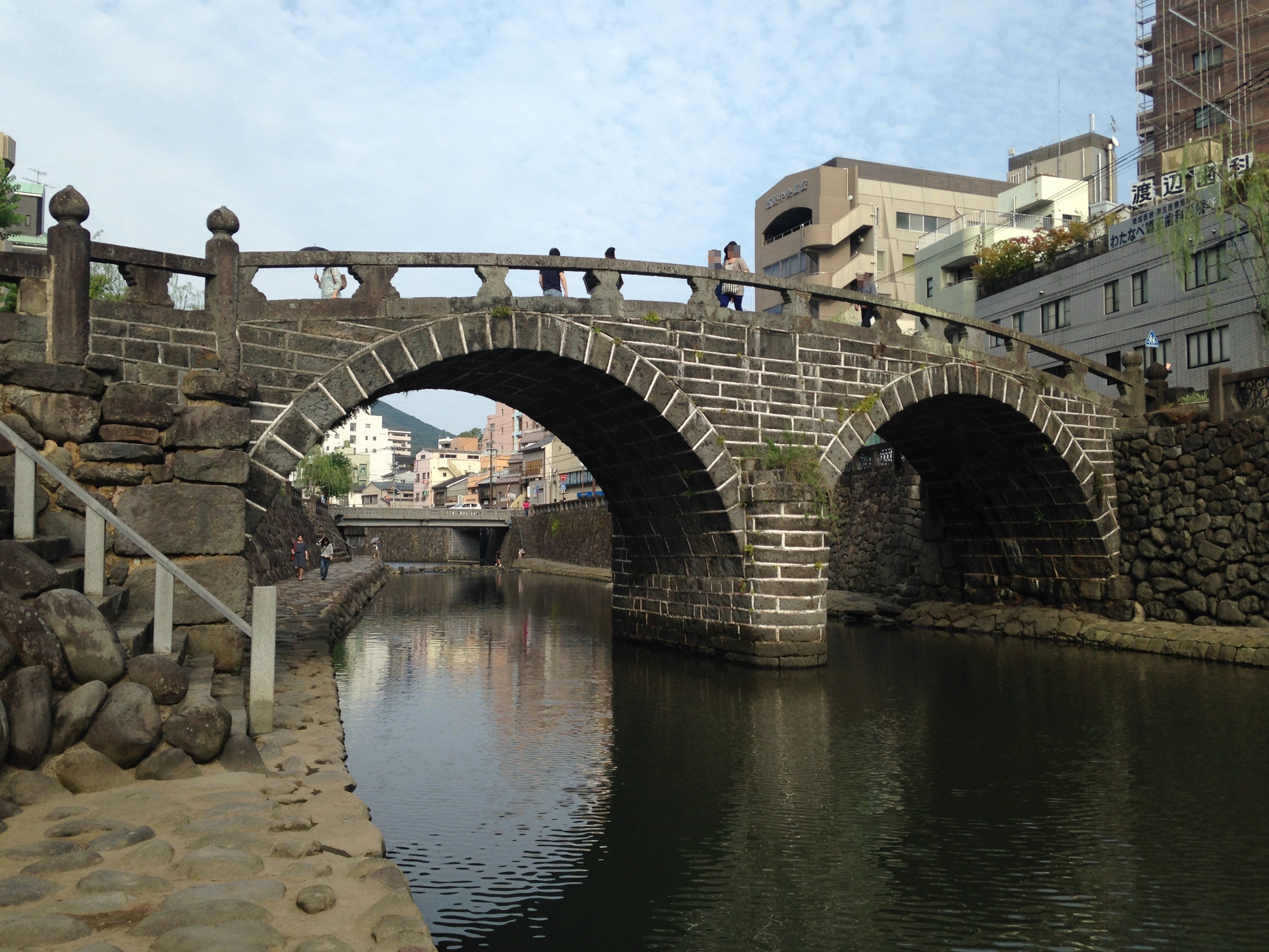 中島川に架かる眼鏡橋